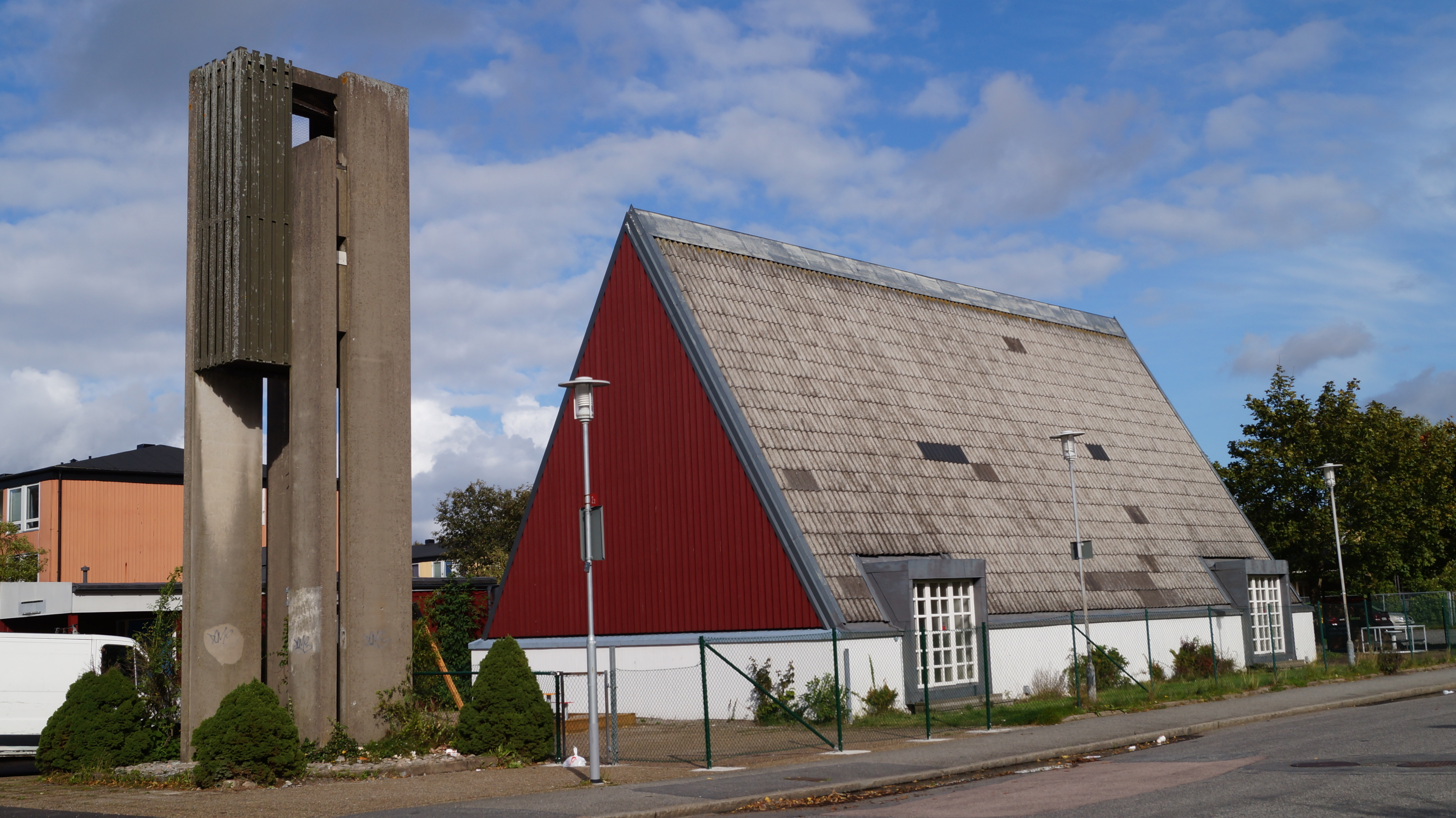 Hammarkullens kyrka (Hjällbo 32:1)